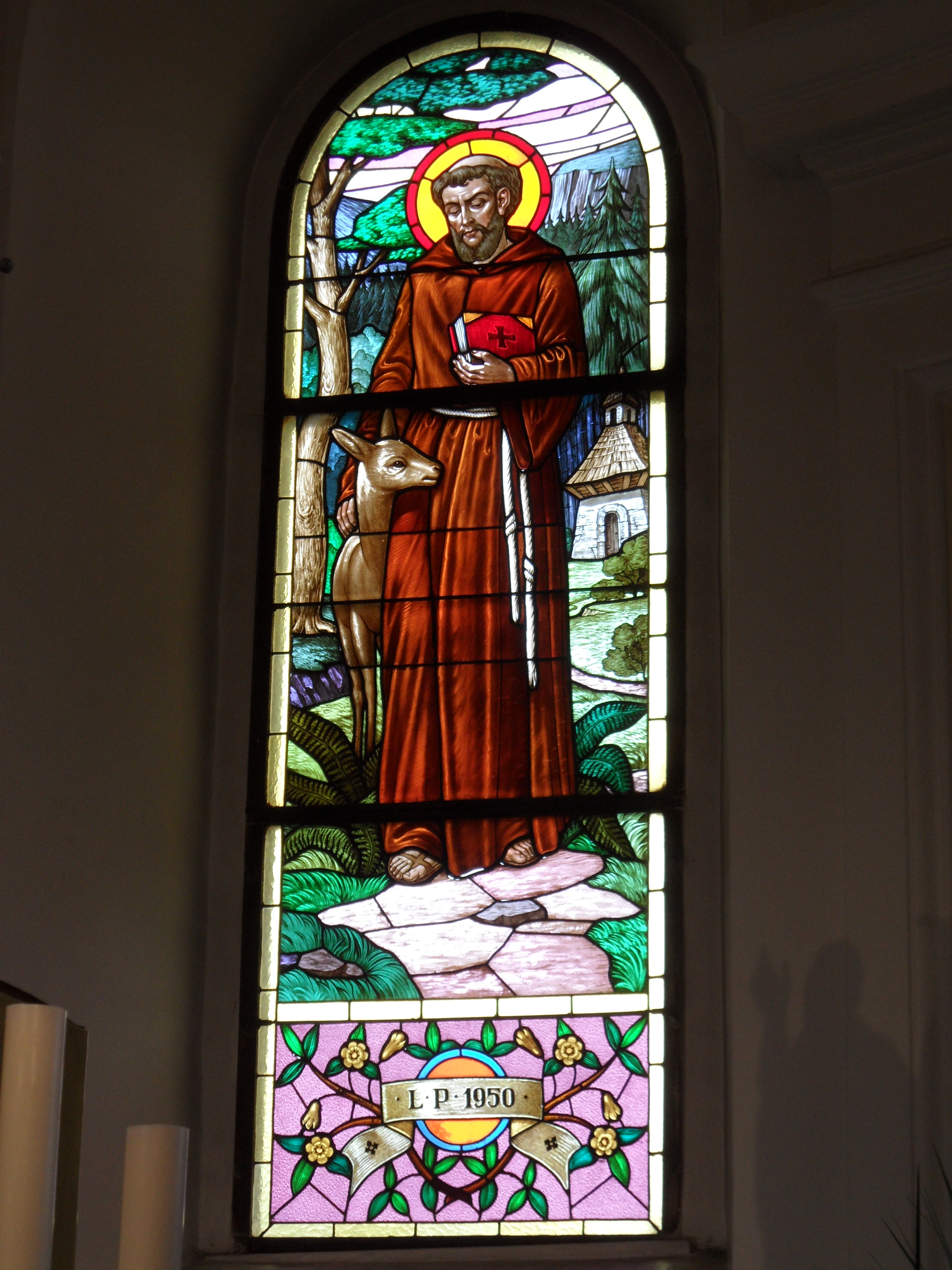 Kostel sv. Jiljí, Brno-Líšeň - interiér - vitráž se sv. Jiljím (1950)